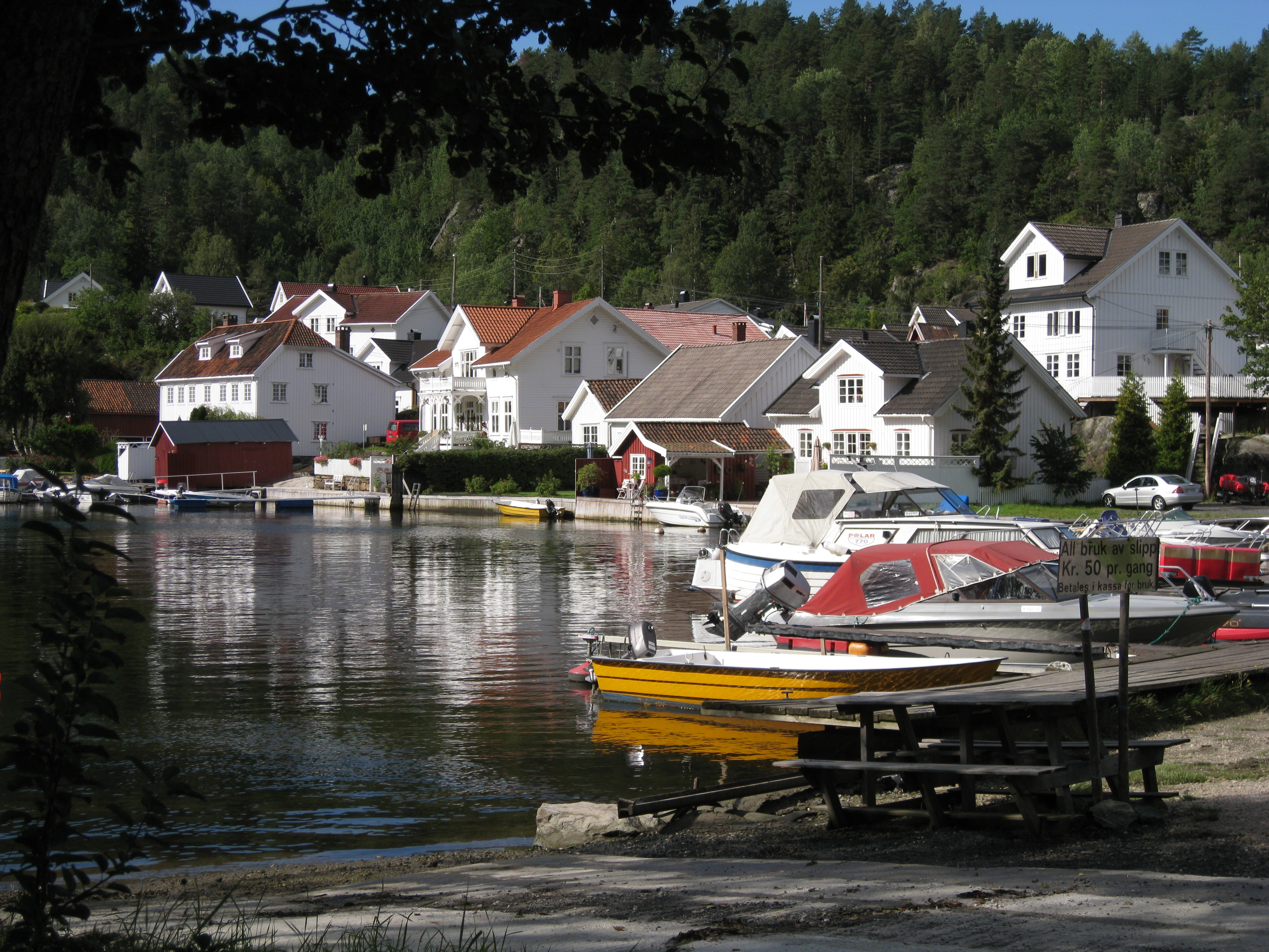 Kil i Sannidal.